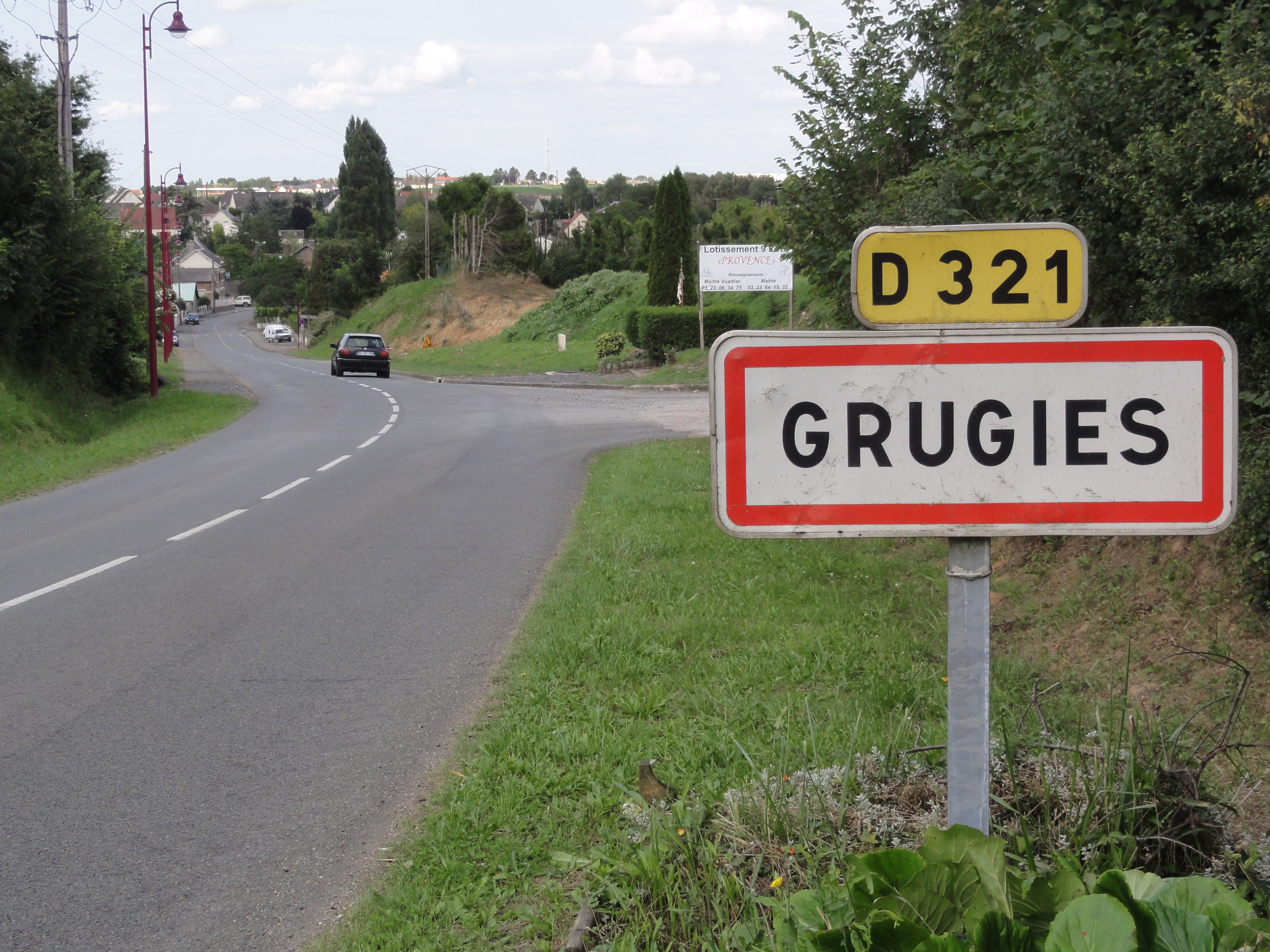 Grugies (Aisne) city limit sign